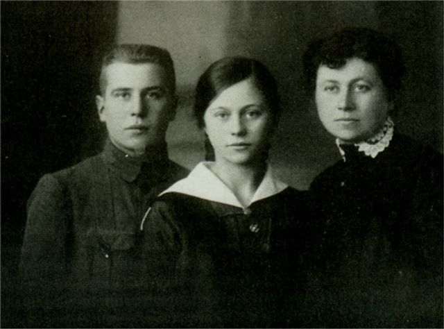 Tomasz Zan, Helena Zan-Stankiewicz, Teresa Dowgiałło